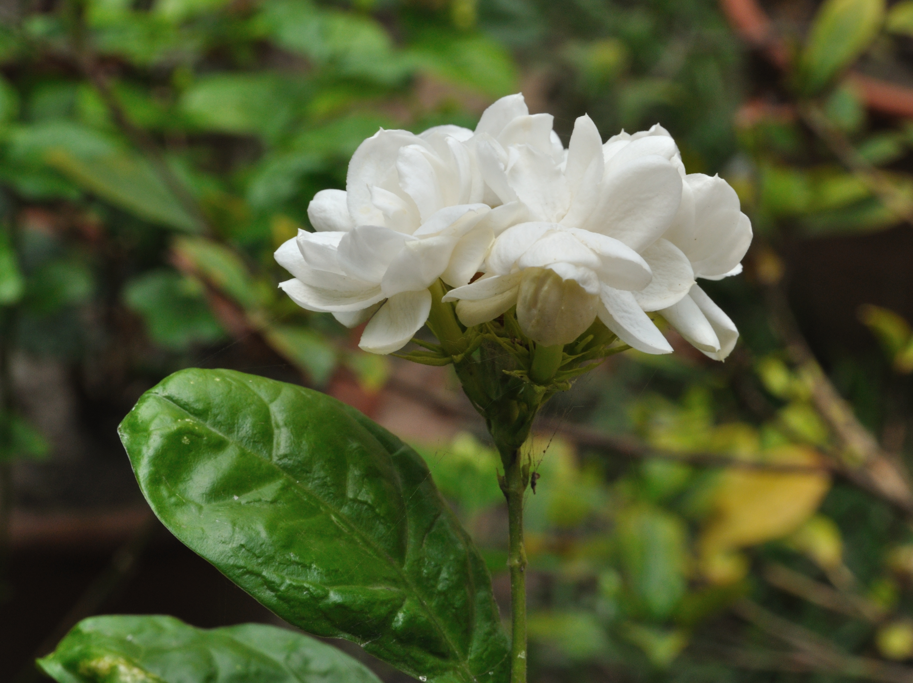 Jasminum sambac 'Arabian Nights' Common name: Arabian Jasmine 'Arabian Nights', Hindi: Bela, Telugu: Malli, Tamil: Kodi mulli, Manipuri: Jati pushpa, Bengali: Bel. Family: Oleaceae (Jasmine family). It is an evergreen vine or shrub, available in India.